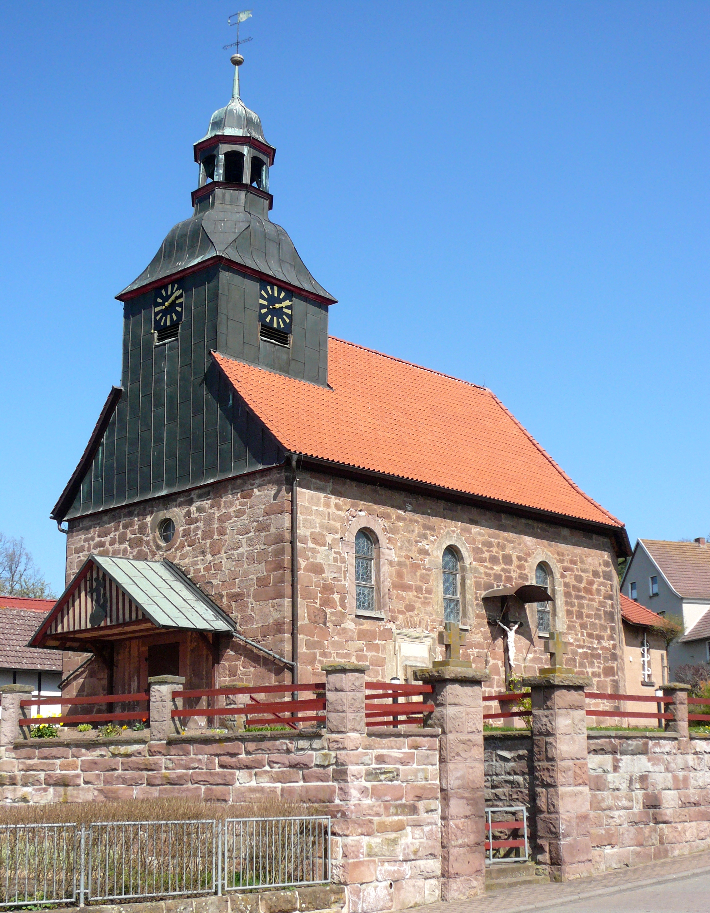 Schachtebich, kath. Kirche St. Magnus